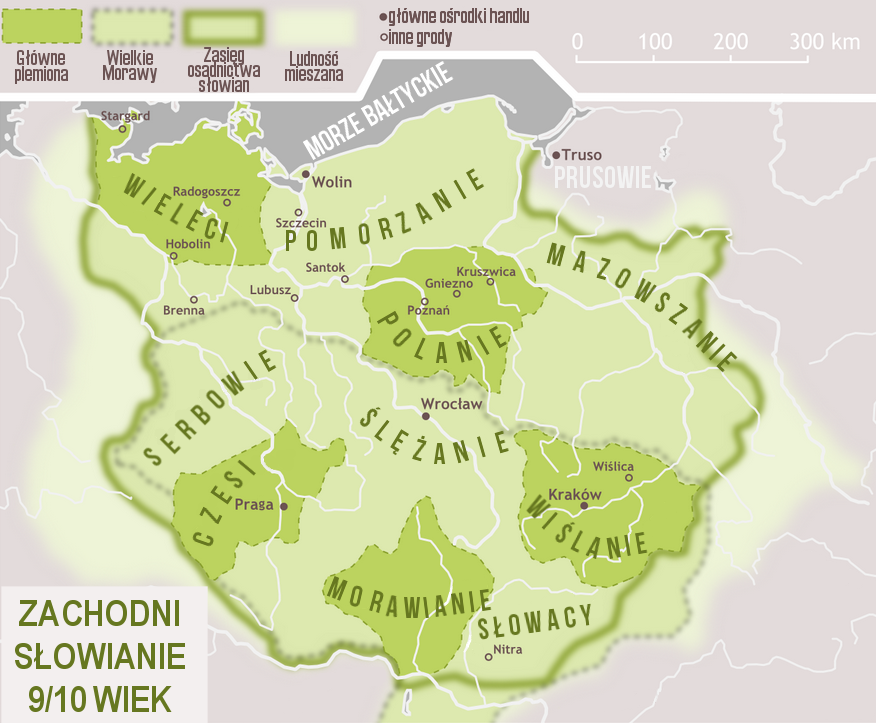 Mapa przedstawia Słowian Zachodnich, główne ośrodki handlu, itp.